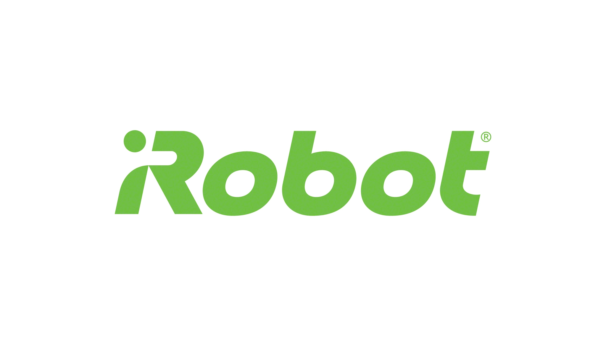 社名公式ロゴ